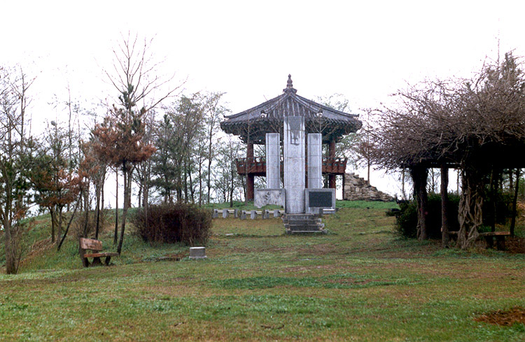 사적 제409호 부안 백산성 (扶安 白山城) - 정상부의동학혁명창의비